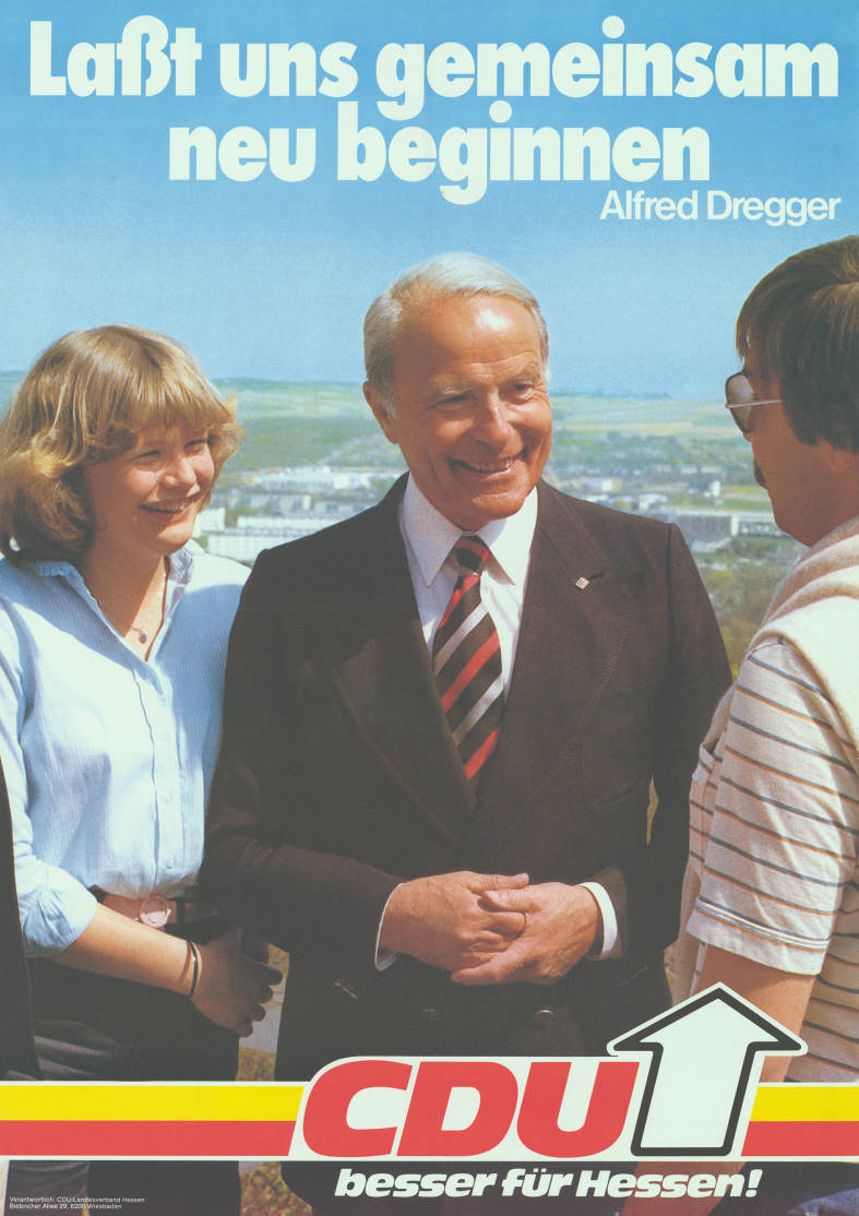 Laßt uns gemeinsam neu beginnen Alfred Dregger CDU Besser für Hessen! Abbildung: Dregger im Gespräch mit junger Frau und einem Mann Plakatart: Motiv-/Textplakat Auftraggeber: Verantw.: CDU-Landesverband Hessen, Wiesbaden Objekt-Signatur: 10-007 : 555 Bestand: Landtagswahlplakate Hessen (10-007) GliederungBestand10-18: Landtagswahlplakate Hessen (10-007) » CDU Lizenz: KAS/ACDP 10-007 : 555 CC-BY-SA 3.0 DE